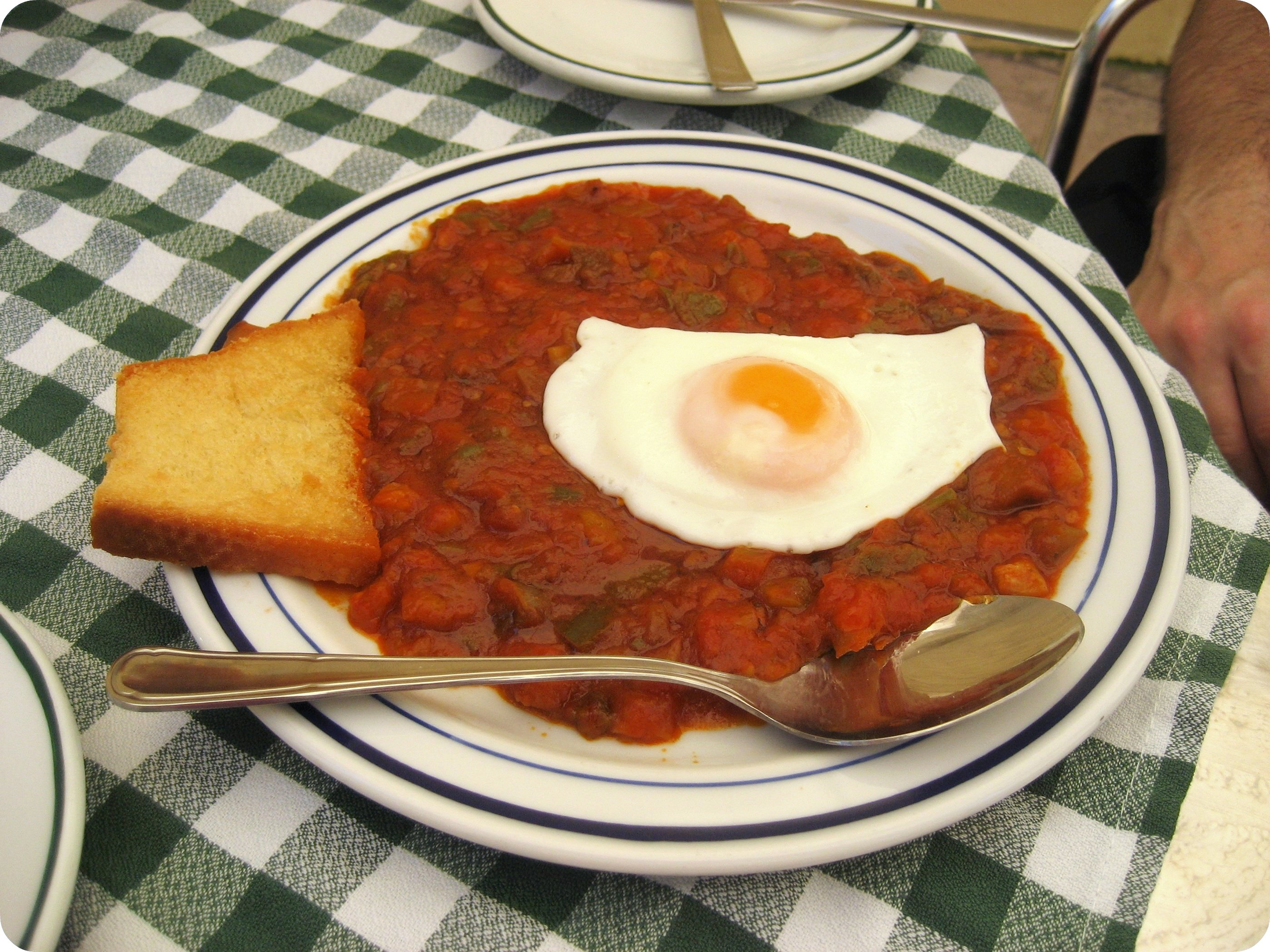 Pisto from Taberna San Miguel (Casa El Pisto)